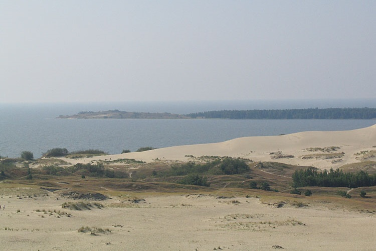 Nida